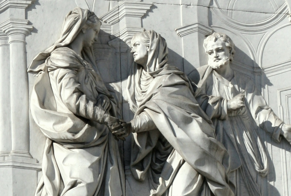 La Visitación, relive de Juan Domingo Olivieri, fachada de la iglesia del Convento de las Salesas Reales de Madrid, actual parroquia de Santa Bárbara (1750-1758).